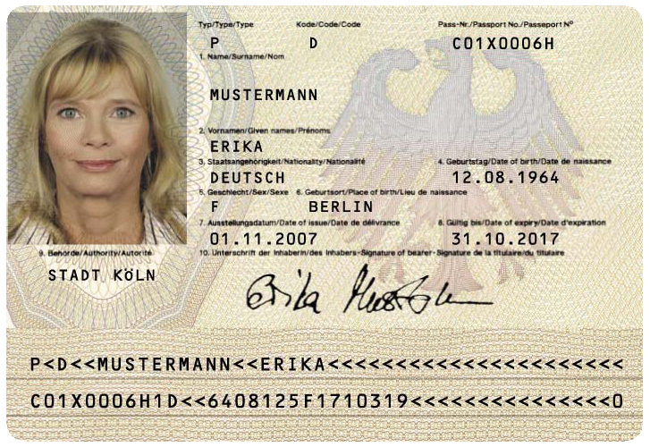 Datenseite des deutschen Reisepasses von Erika Mustermann (Muster 2007).